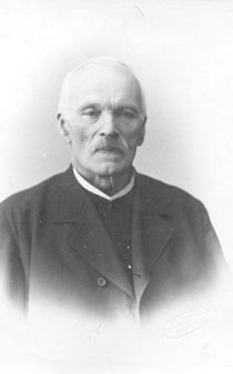 Leonhard Masing